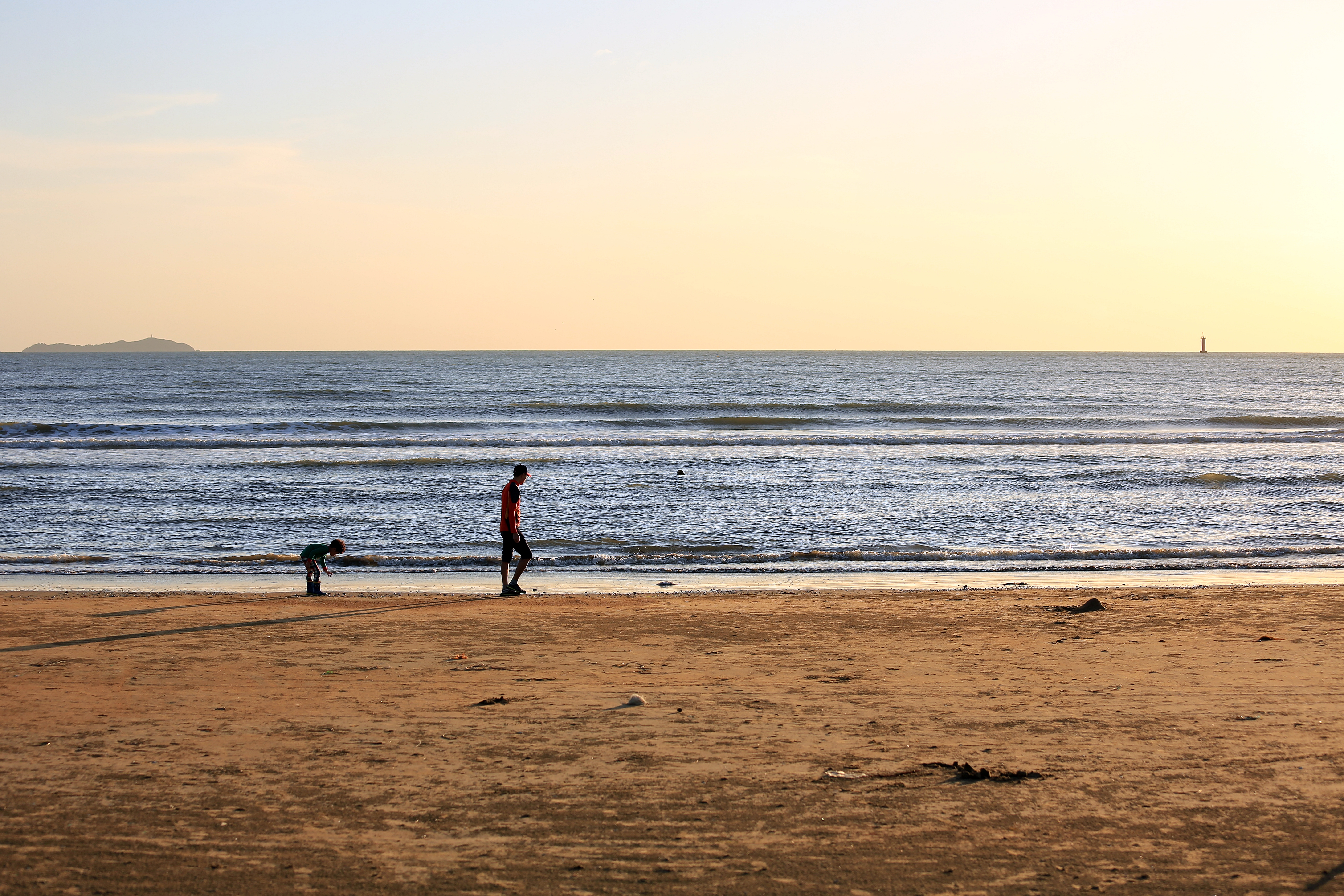 해식지형으로 경치가 아름다울 뿐만 아니라 학암포·백리포·만리포·연포·몽산포·삼봉·꽃지 등의 해수욕장이 조성되어있다.